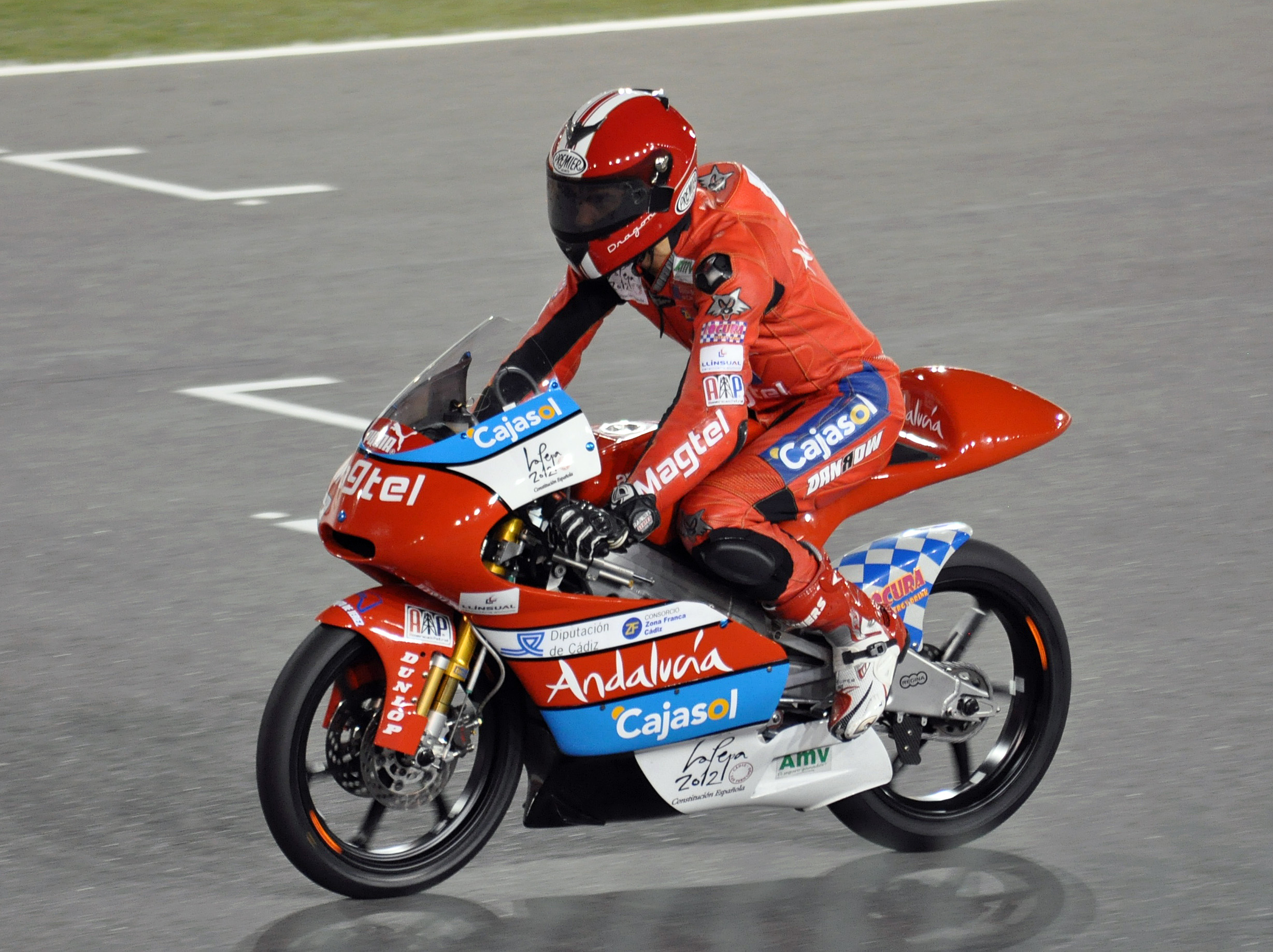 Alberto Moncayo